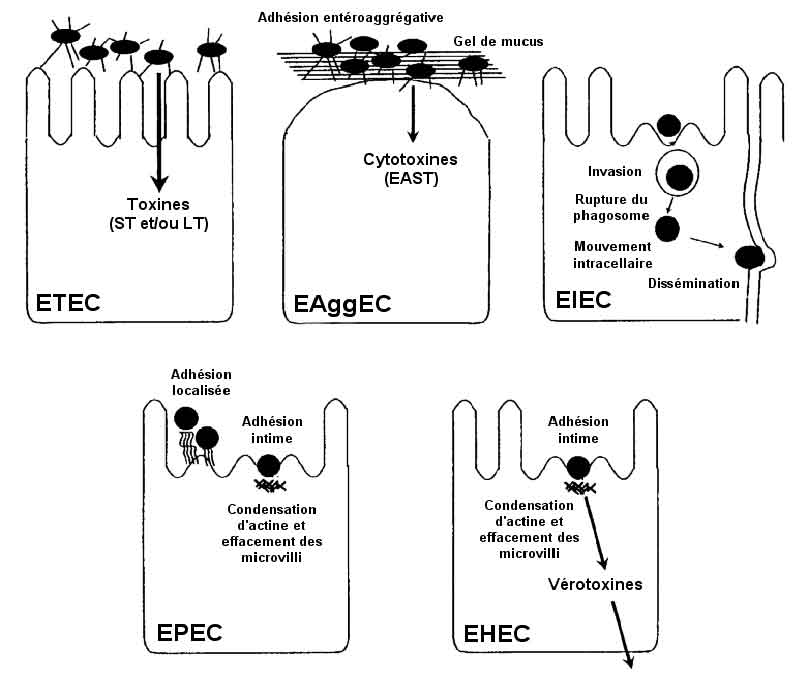 Ce schéma décrit les modes d'actions des grands pathovars de la bactérie Escherichia coli induisant des diarrhées.